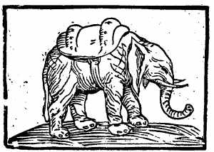 Hanno (woodcut)